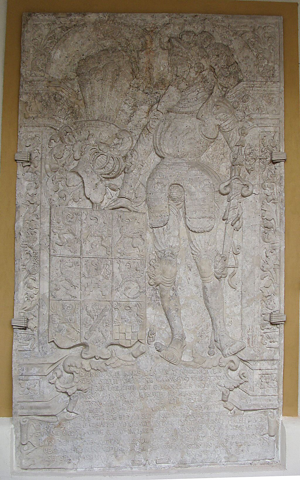 Płyta z wizerunkiem Barnima III - Zamek Książąt Pomorskich w Szczecinie